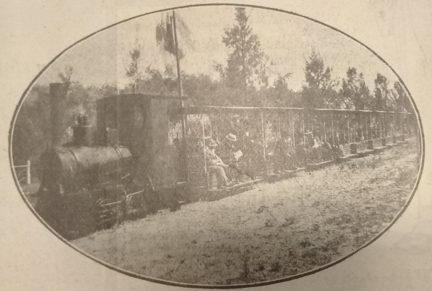 Decauville del Real de San Carlos, Colonia, República Oriental del Uruguay. Tranvia a vapor que conduce desde el hotel hasta la playa de banos.